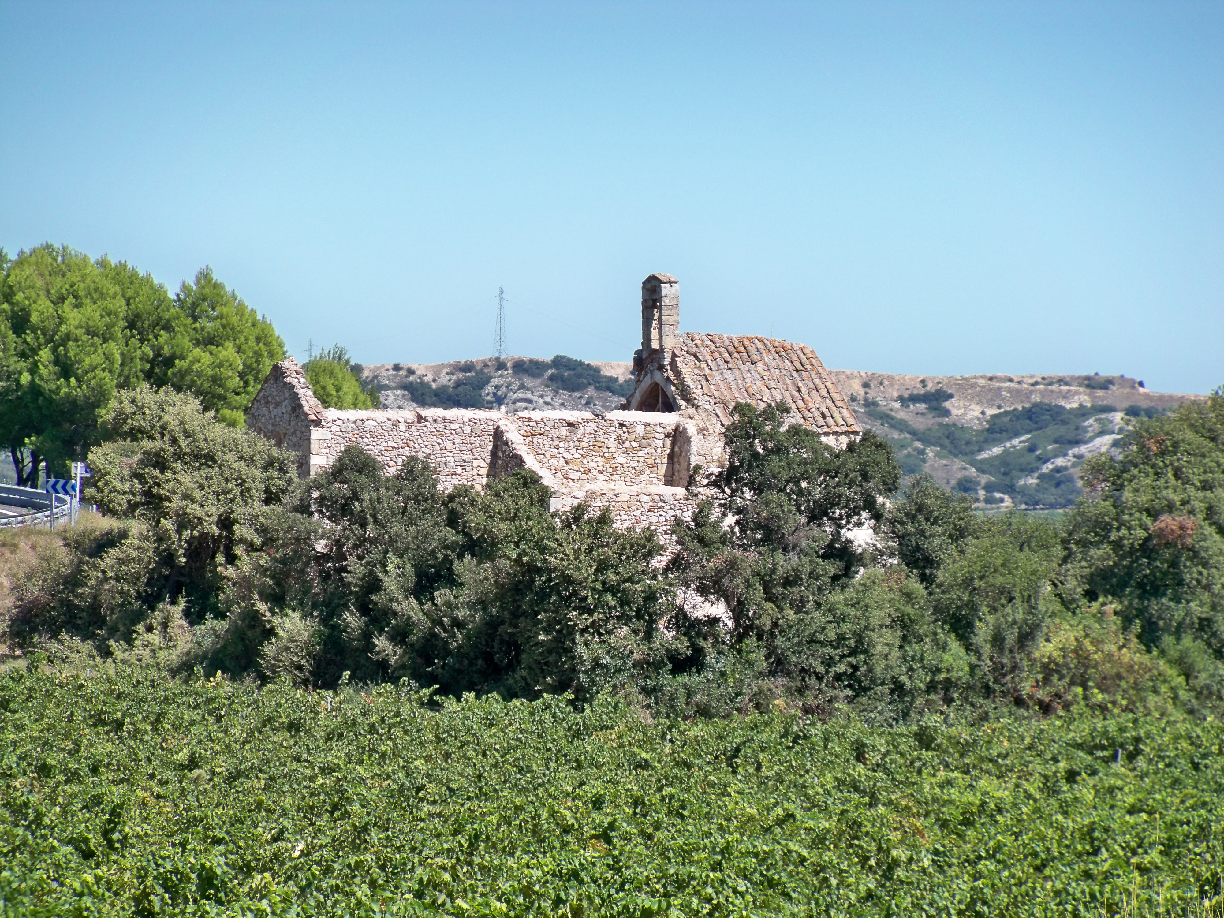 Chapelle Saint Agricol à Roquemaure (Gard), sur la route de Tavel